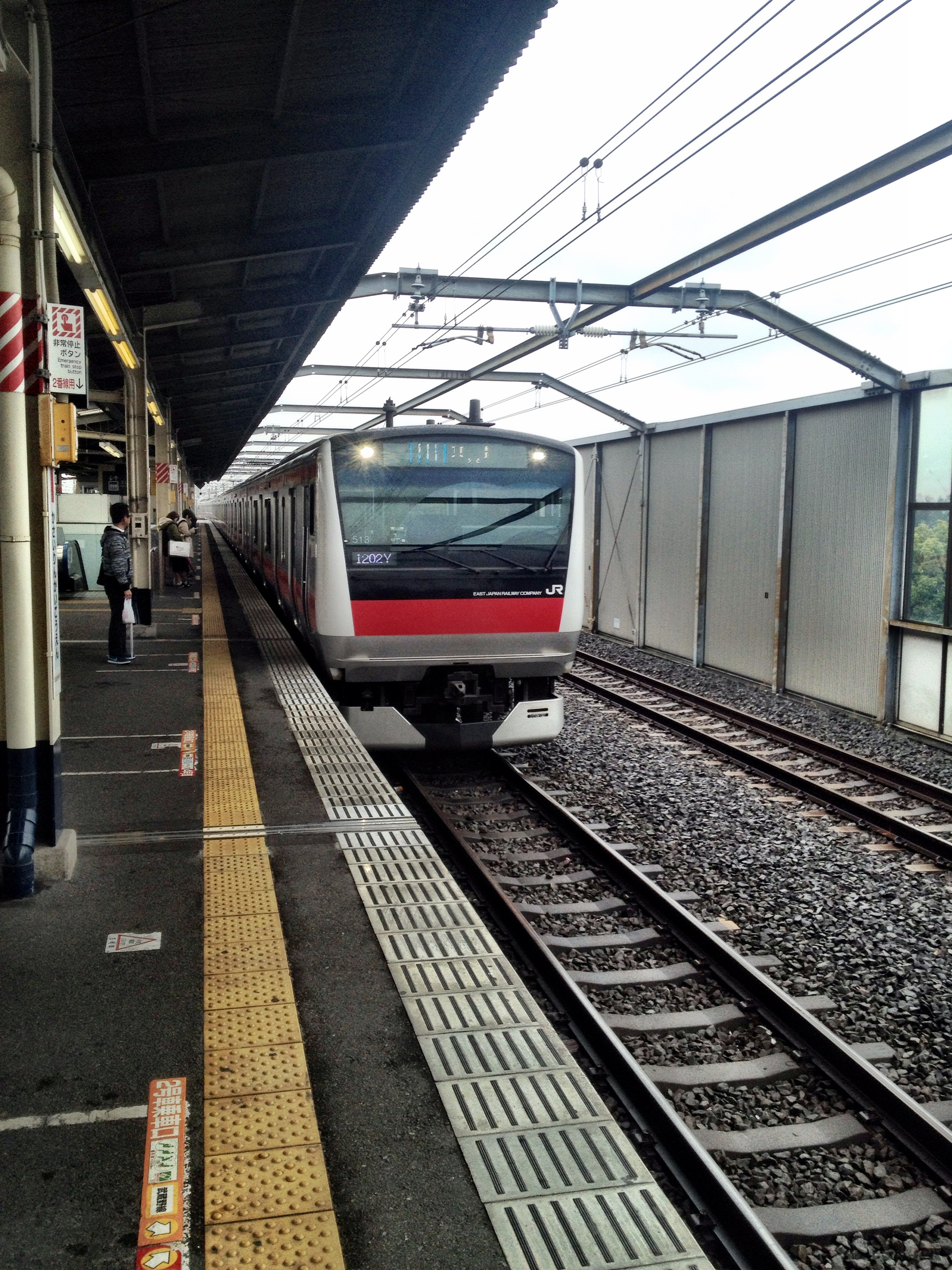 Прибытие поезда на станцию